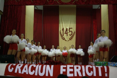 majoretele cnu craciun 2011